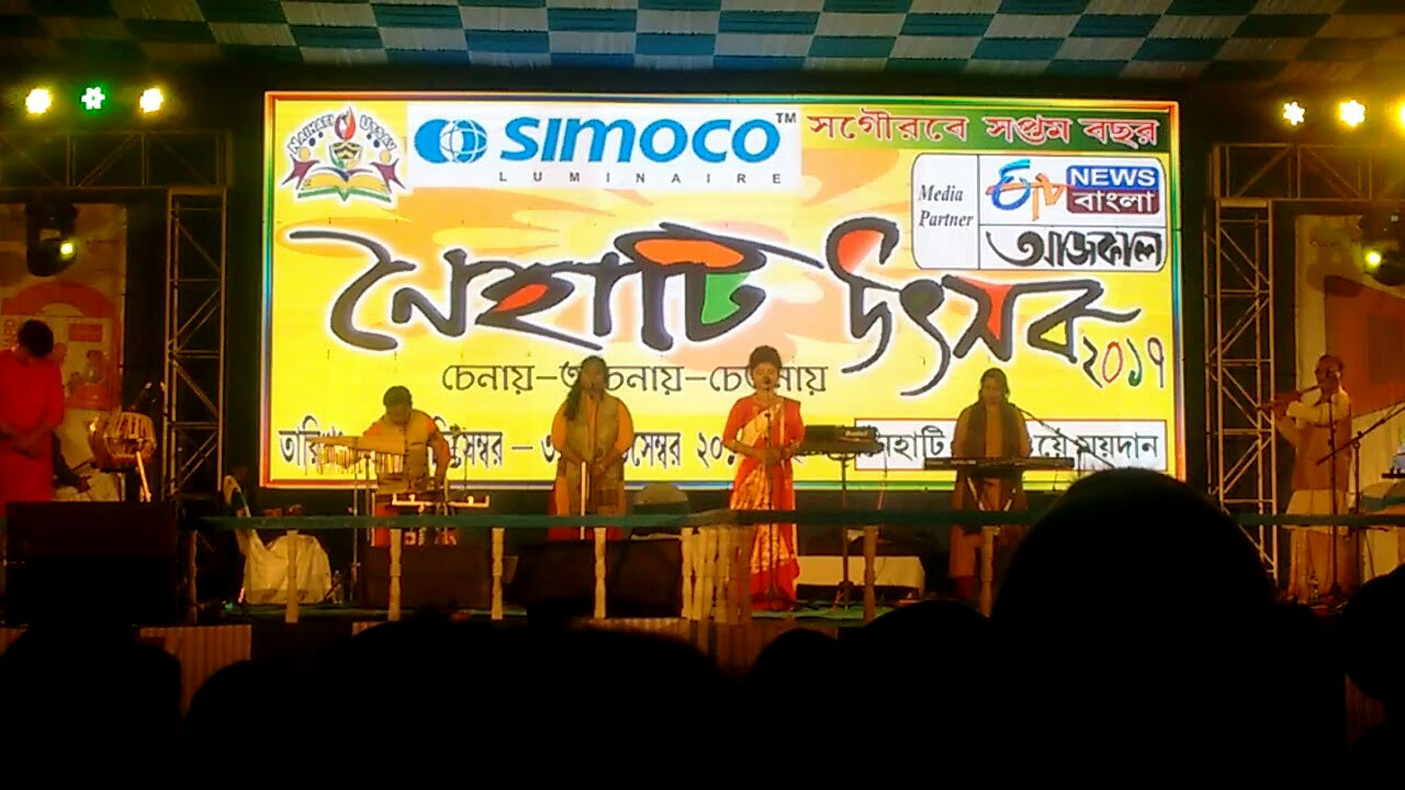 নৈহাটি উৎসবের একটি দৃশ্য